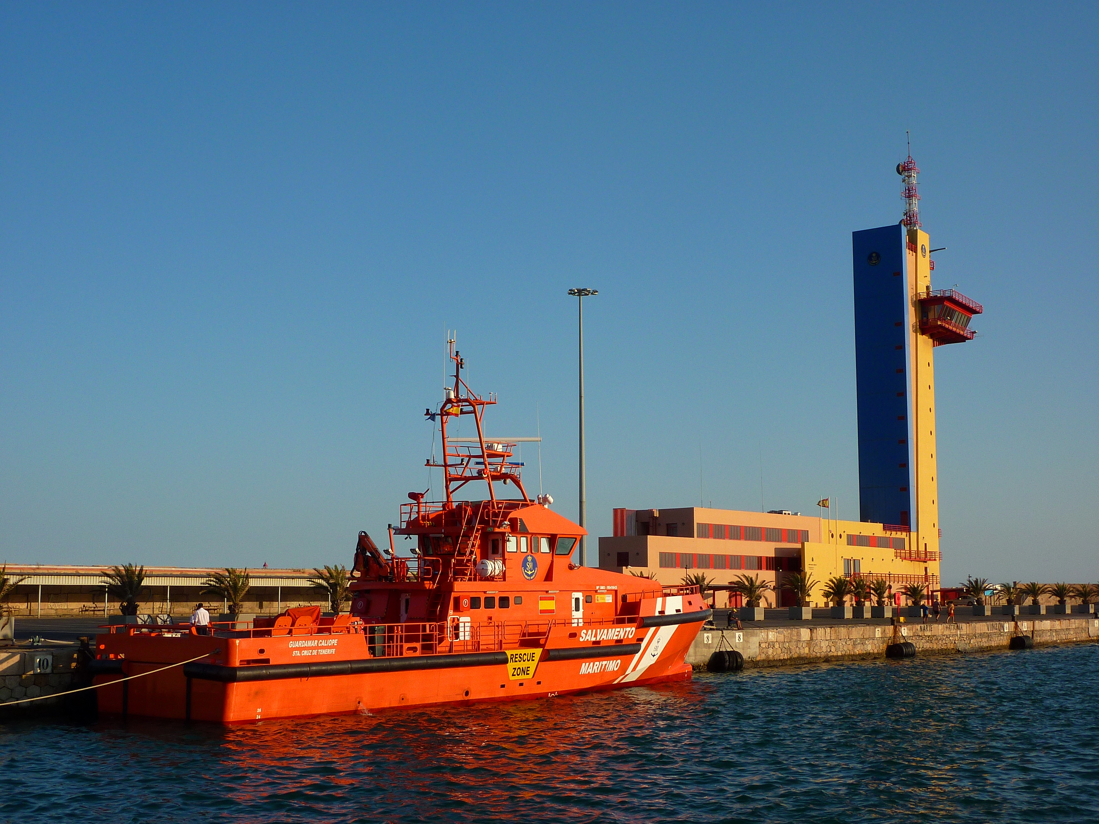 Embarcación de Intervención Rápida clase Guardamar "Guardamar Calíope" (G-40) de la Sociedad de Salvamento y Seguridad Marítima.